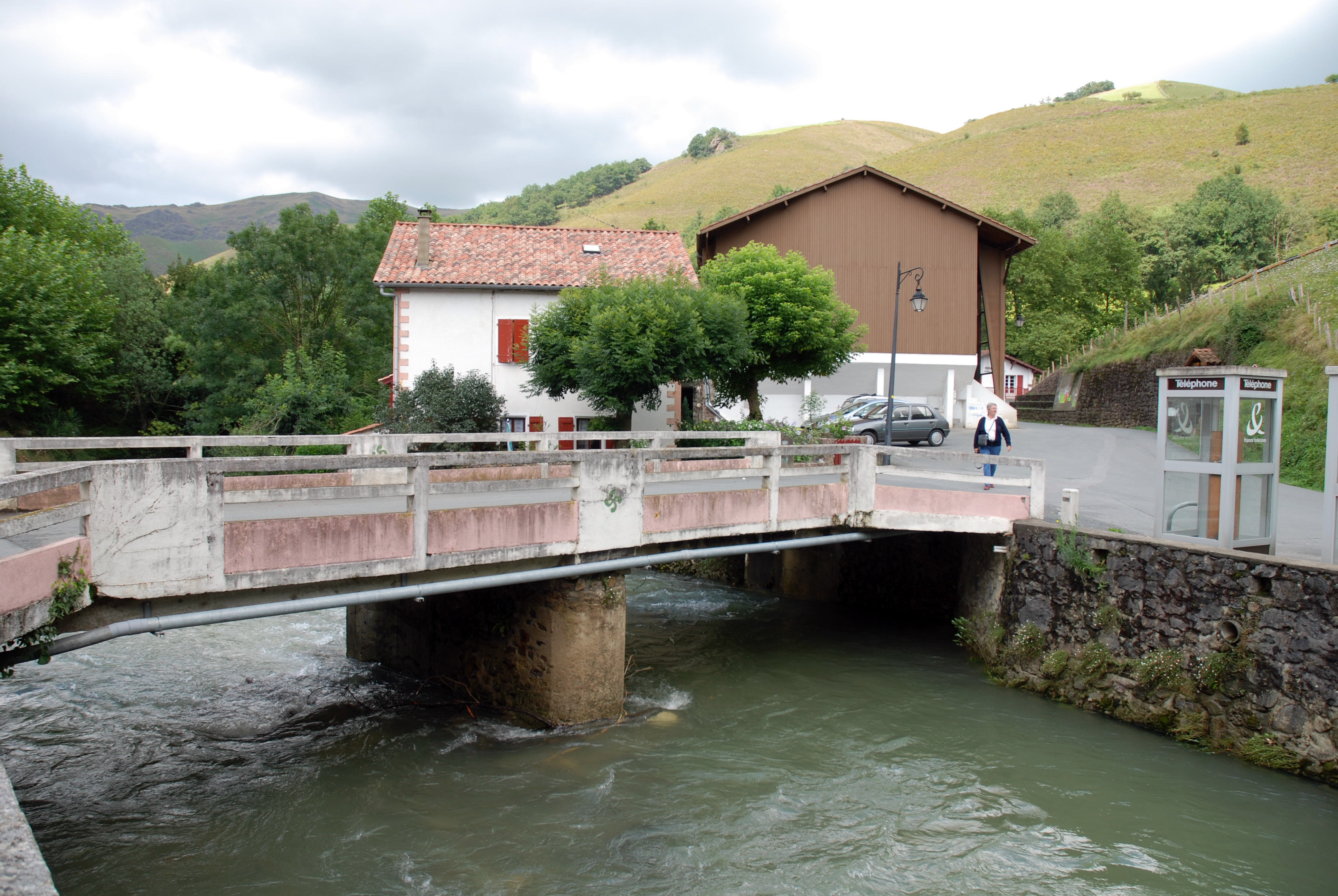 Estérençuby, pont sur la Nive de Béhérobie.